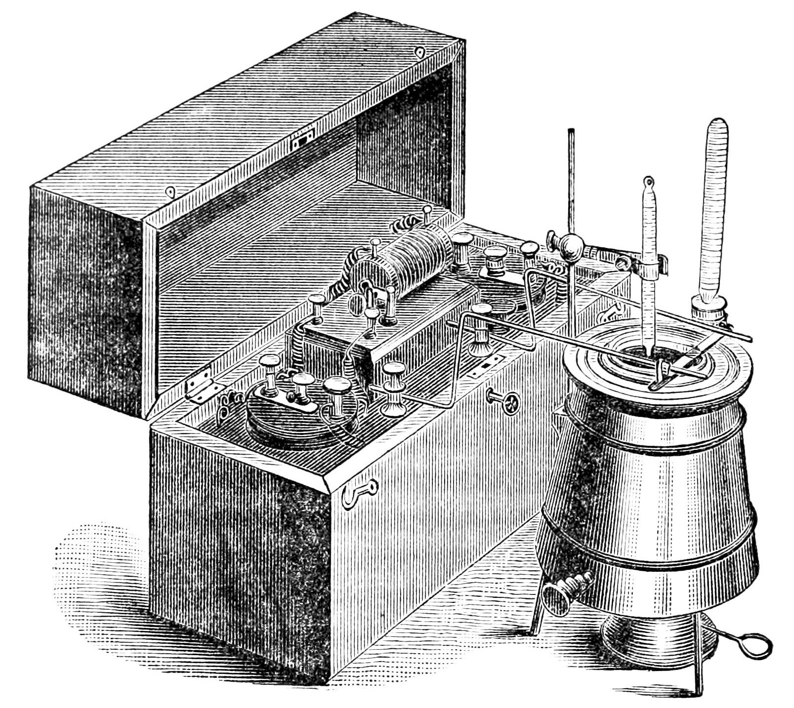 The Saybolt kerosene vapor tester